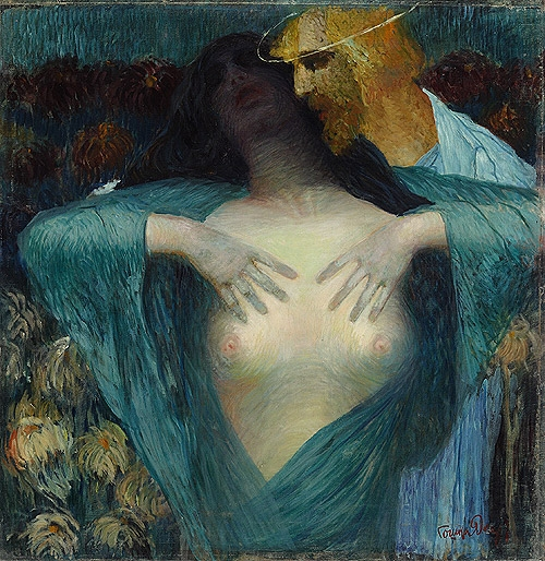 Сънят на Мария Магдалена